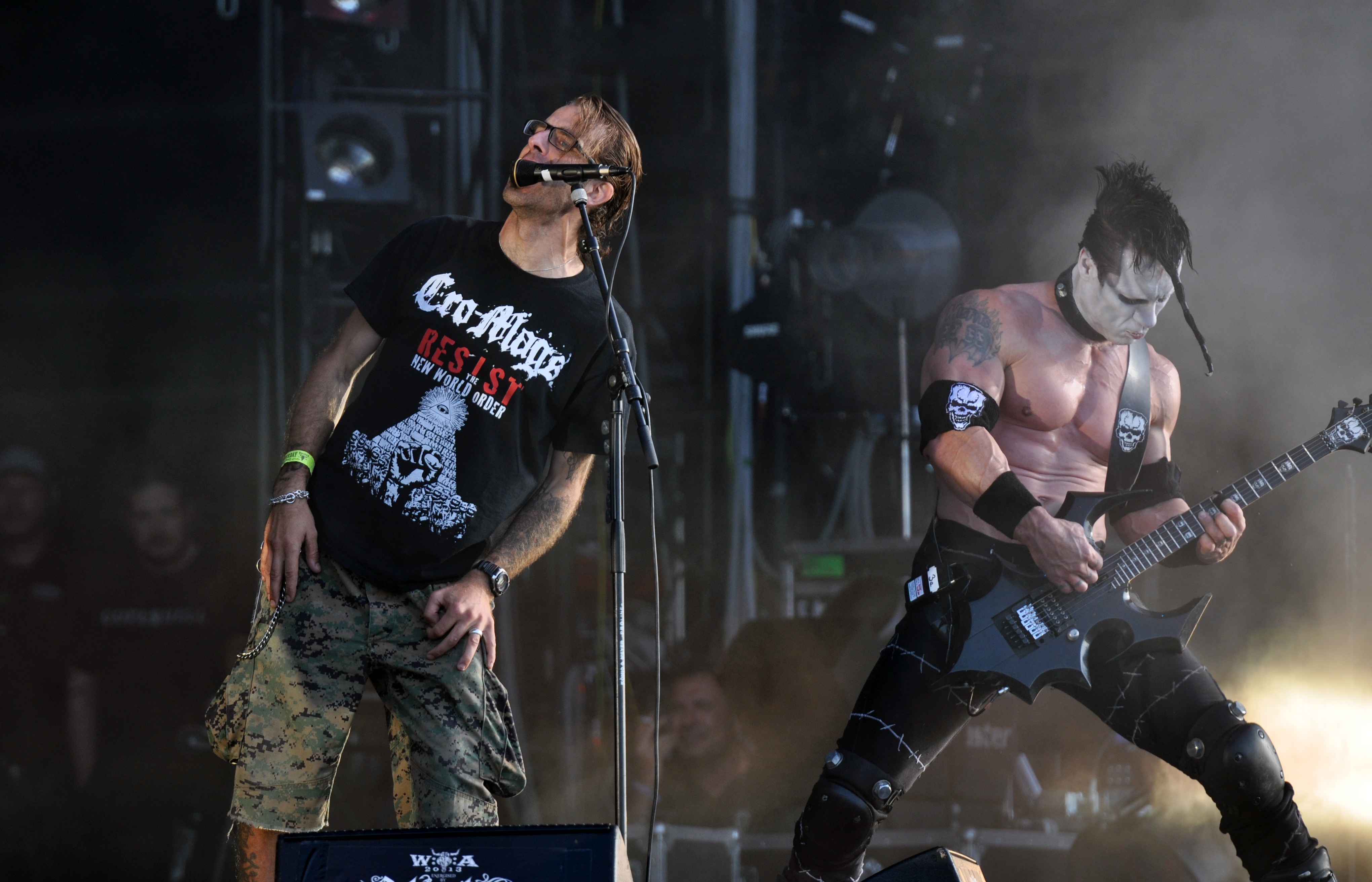 Danzig at Wacken Open Air 2013